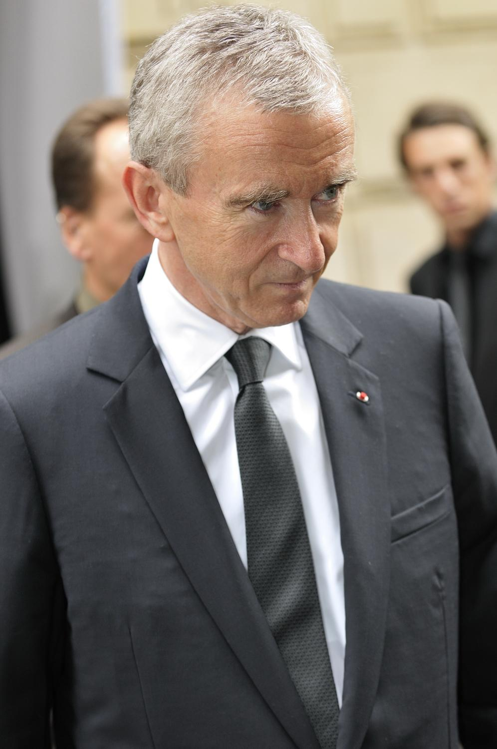 Bernard Arnault au défilé de la collection haute couture automne-hiver 2009/2010 de Jean-Paul Gaultier à Paris le 6 juillet 2009.